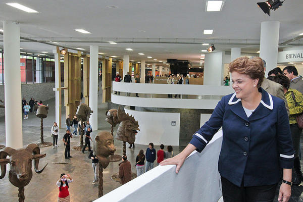 10/10/2010. A candidata conheceu as obras de arte expostas na mostra. Ela defendeu a adoção de políticas culturais como prioridades tão importantes quando ações voltadas ao desenvolvimento econômico. Foto: Roberto Stuckert Filho/Divulgação Acompanhe diariamente a Rede Brasil Atual